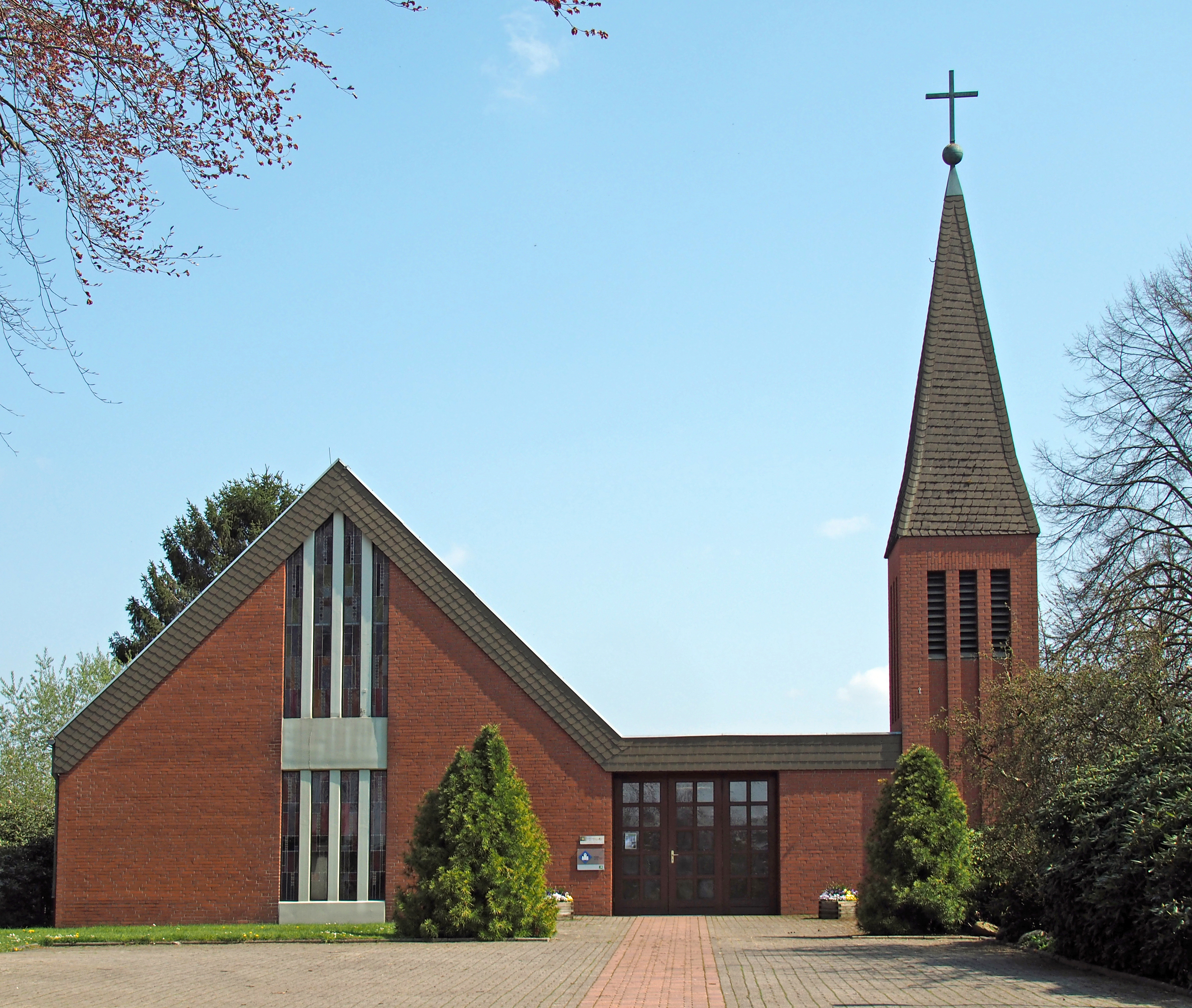 St. Johannis-Kirche von 1997 in Bleckmar Stadt Bergen, Niedersachsen